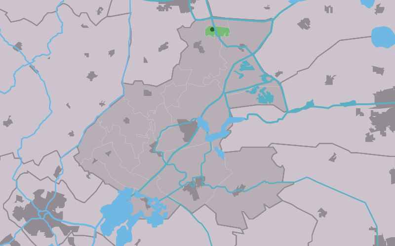 Kaartsje fan himrik fan Warstiens